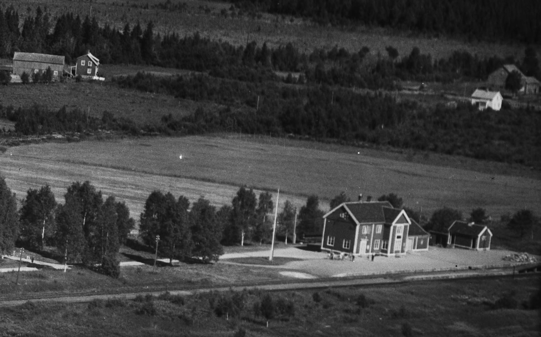 Stod stasjon på Nordlandsbanen. Foto: Widerøe, fra Nasjonalbibliotekets samling.